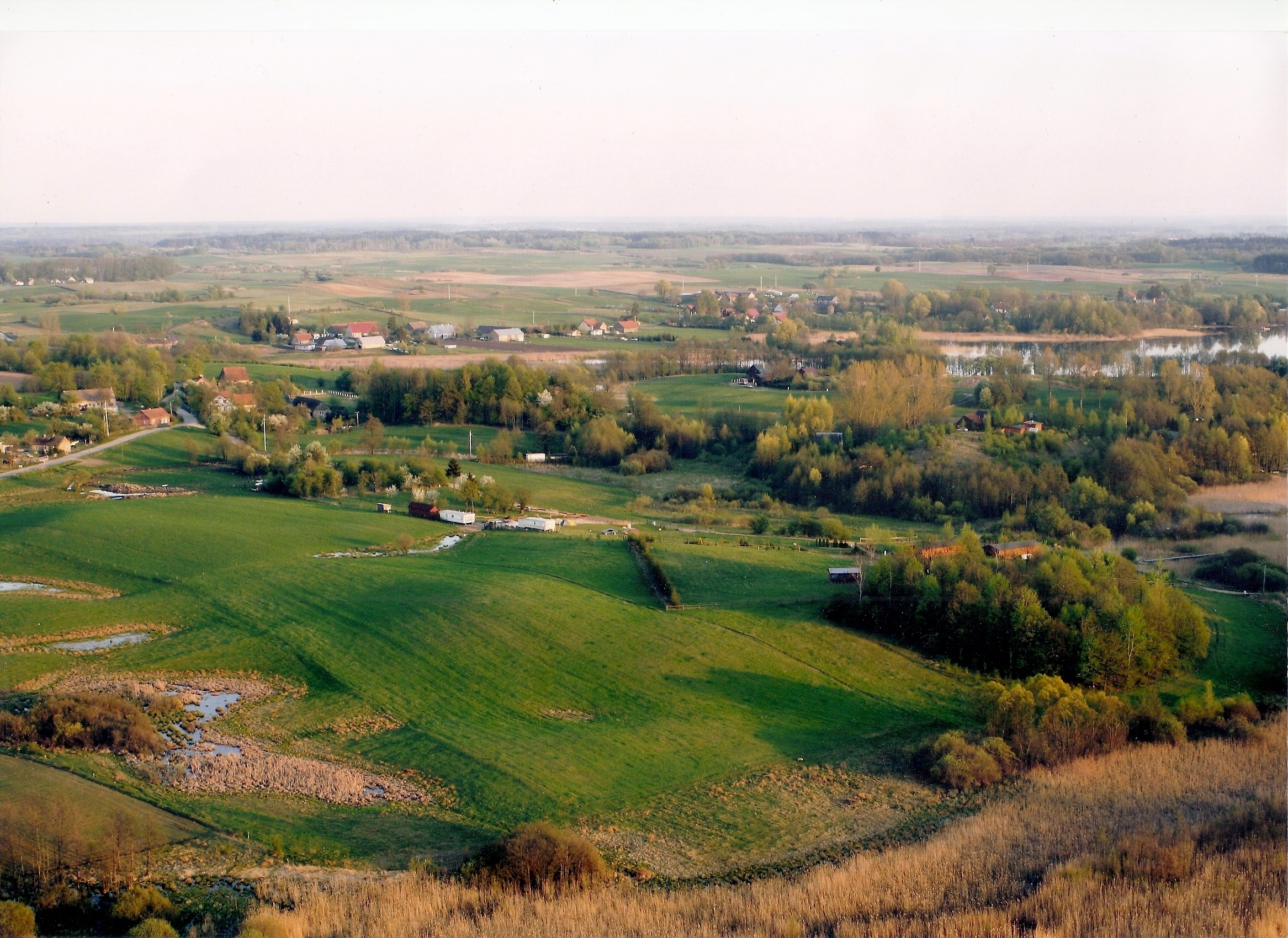 Ciernie z lotu ptaka